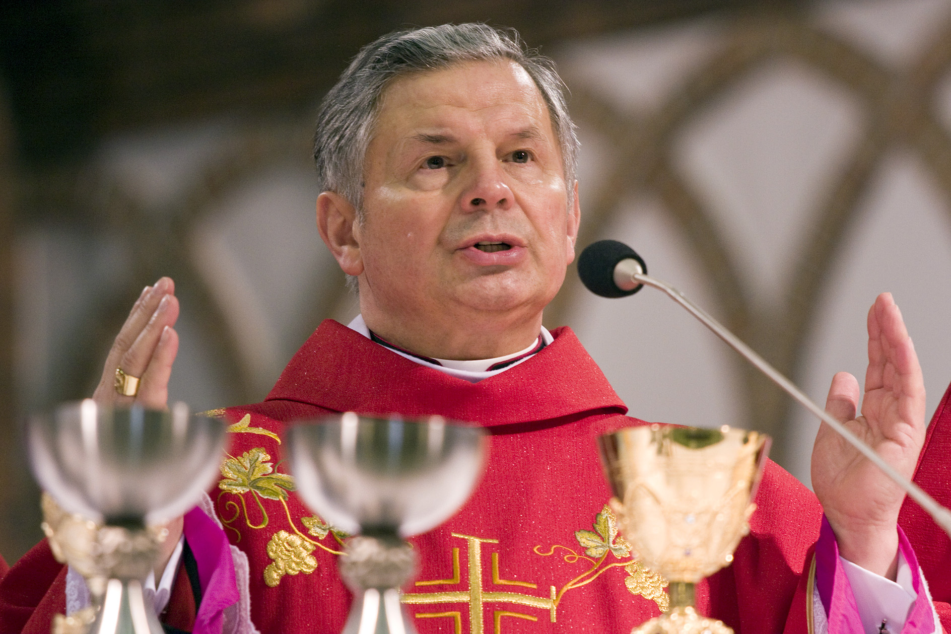 Eucharystia Młodych, XXIII Światowe Dni Młodzieży - obchody w diecezji siedleckiej